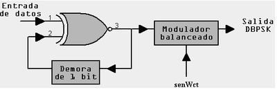 figura0001